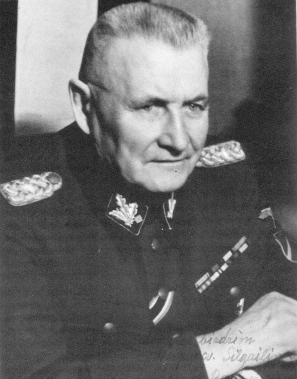 Nació en el Imperio Ruso (Letonia) el 21 de Julio, 1878 y falleció el 25 de Febrero de 1958 en Alemania. Sirvió militarmente en el imperio ruso, en el movimiento blanco (revolución de 1918), en el ejército Letón y en el Tercer Reich Fué el hombre en alcanzar el máximo rango en la Legión Letona, sosteniendo el rango de SS-Gruppenführer, lideraba la legión junto a diferentes diputados y subordinados.